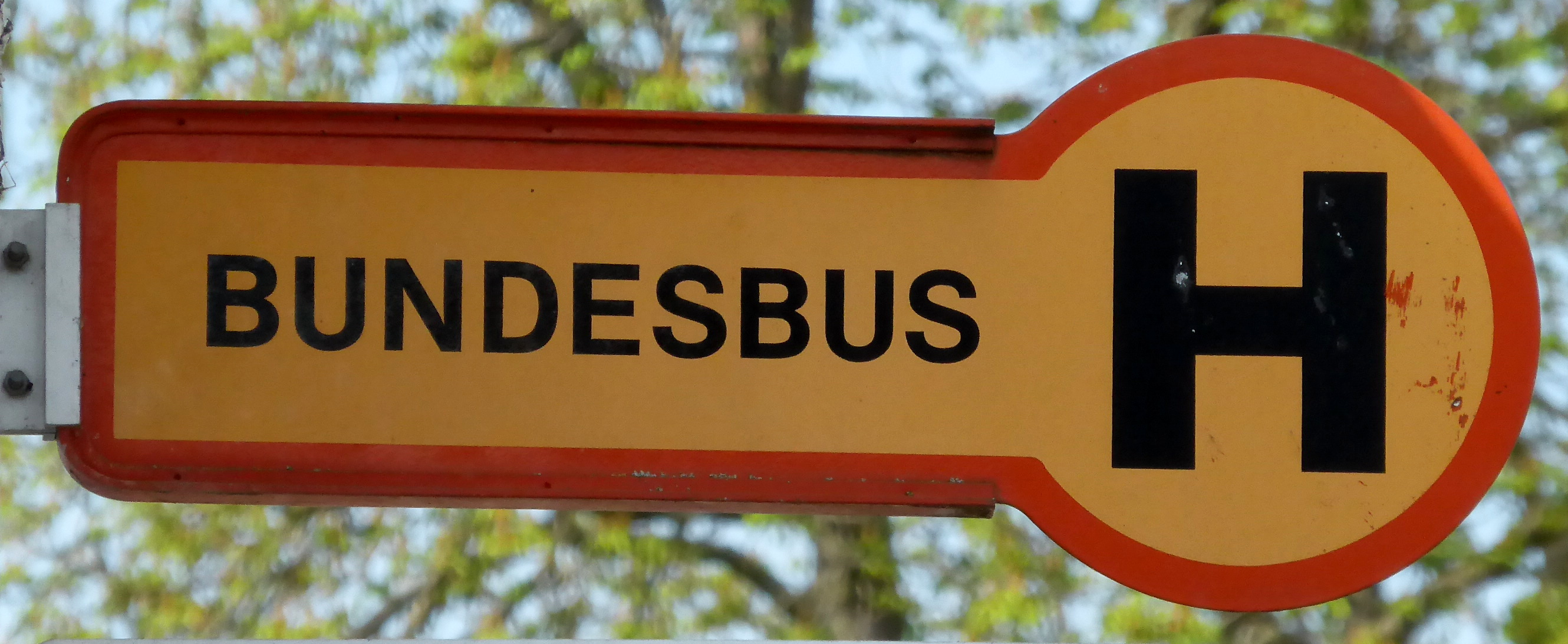 Bundesbus-Haltestellenschild am grenznahen Bahnhof von Laufen (Salzach).